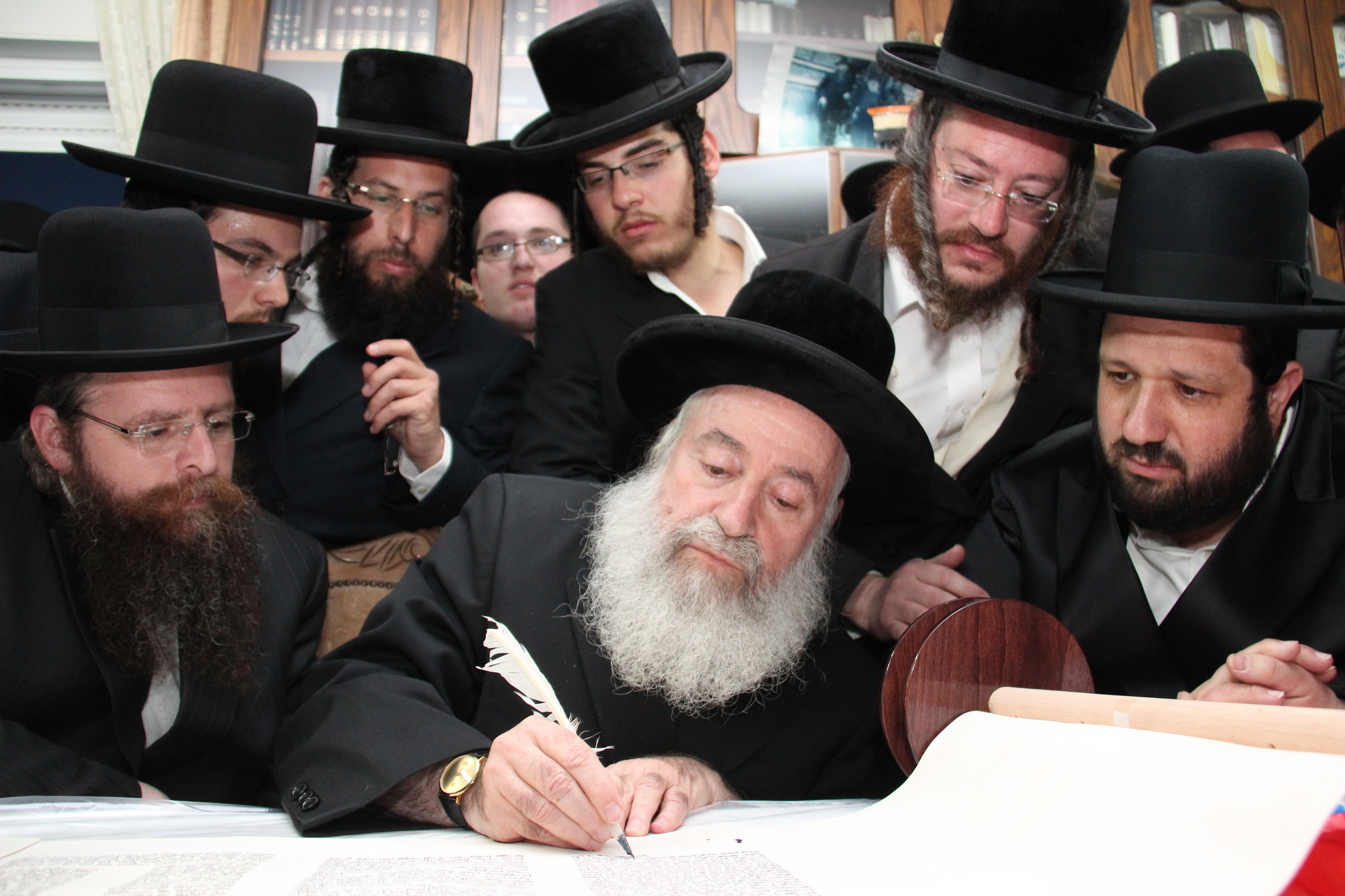 כתיבת ספר תורה ביתר עילית לע"נ רבי שלמה שטנצל